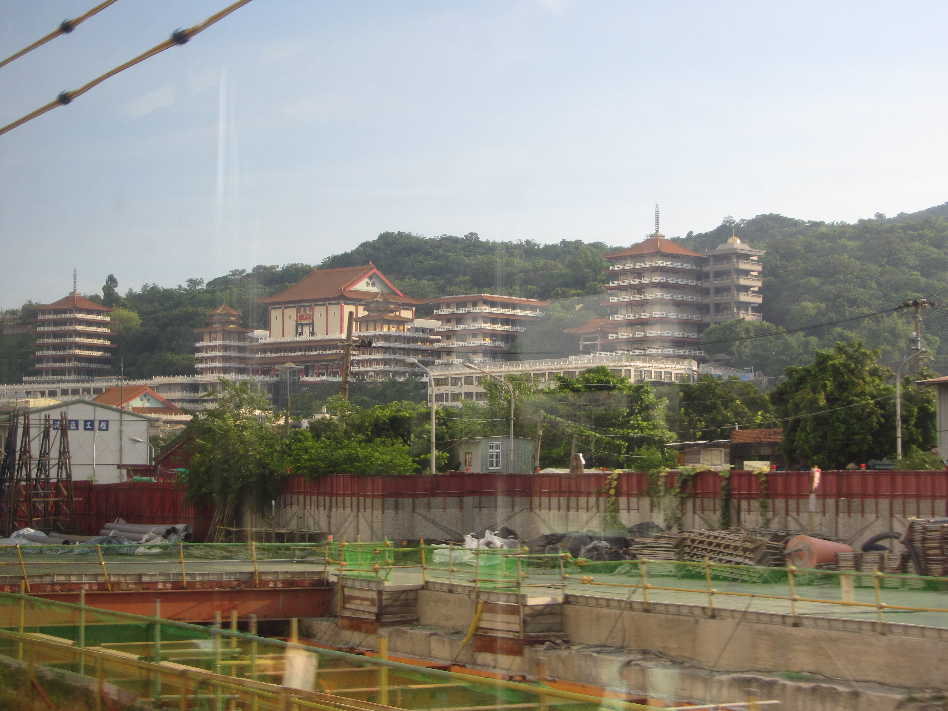 高雄鼓山區元亨寺